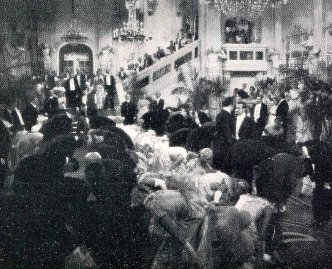 Il diario di una donna amata (Maria Baschkirtseff) - regia di Hermann Kosterlitz - produz Astra Film Tobis Vienna - 1936 - foto di scena